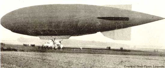 Public domain aus der Jean-Pierre Lauwers-sammlung.